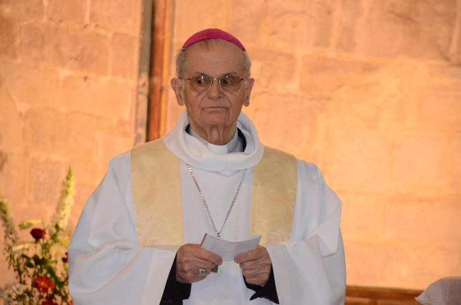 Mgr Jacques Despierre, lors d'une messe à Carcassone.